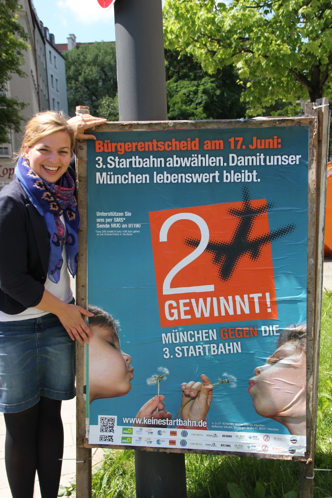 Katharina Schulze präsentiert das Plakat zum Bürgerentscheid über die Dritte Startbahn am Münchner Flughafen